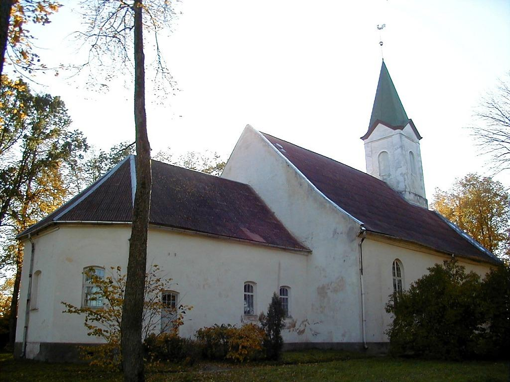 Umurgas baznīca 2000-10-01